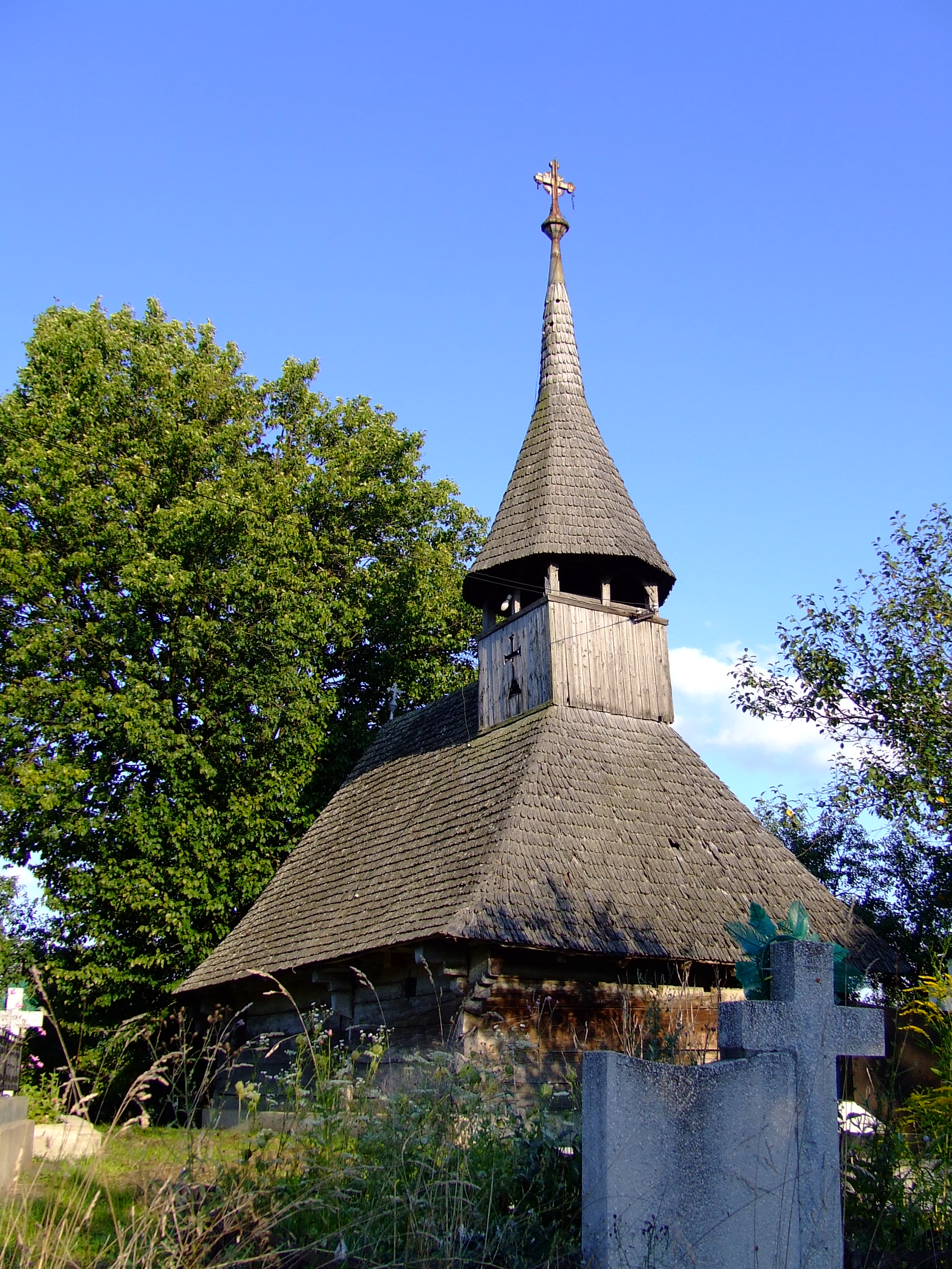 Biserica de lemn din Jac, Sălaj. Autor: Bogdan Ilieş Data: august 2006